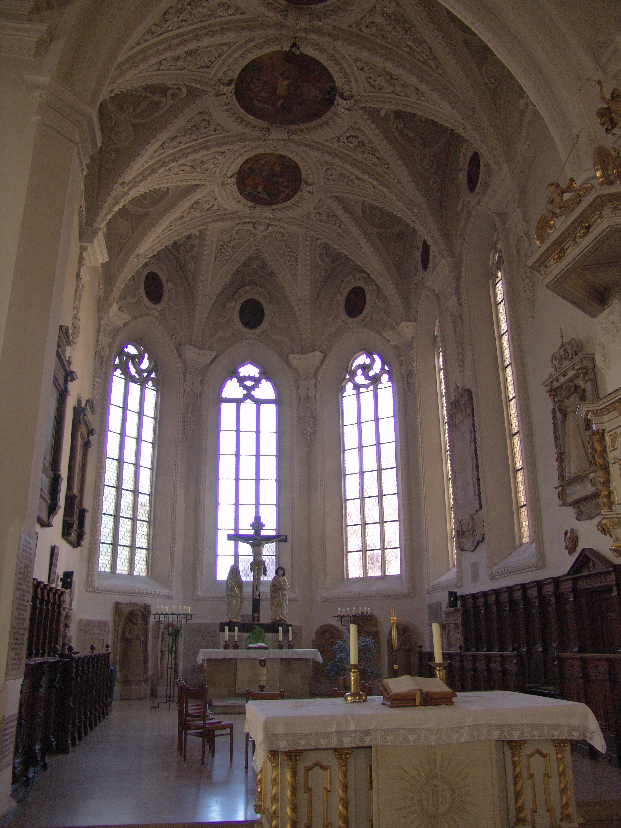 evang.-luth. Stadtpfarrkirche St. Jakob in Oettingen